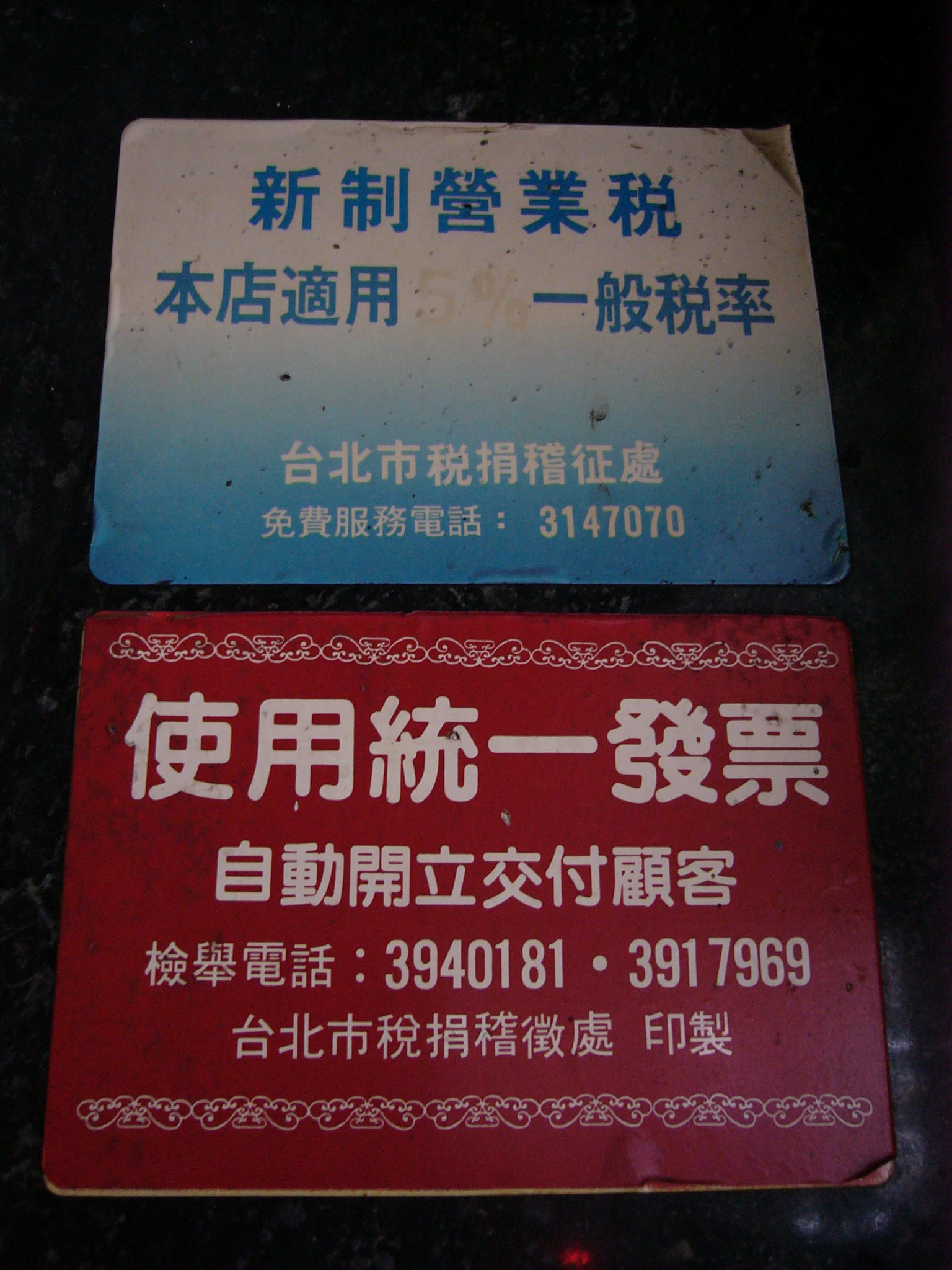 中文（台灣）: 臺北市稅捐稽徵處印製的「新制營業稅，本店適用5%一般稅率」與「使用統一發票，自動開立交付顧客」貼紙。